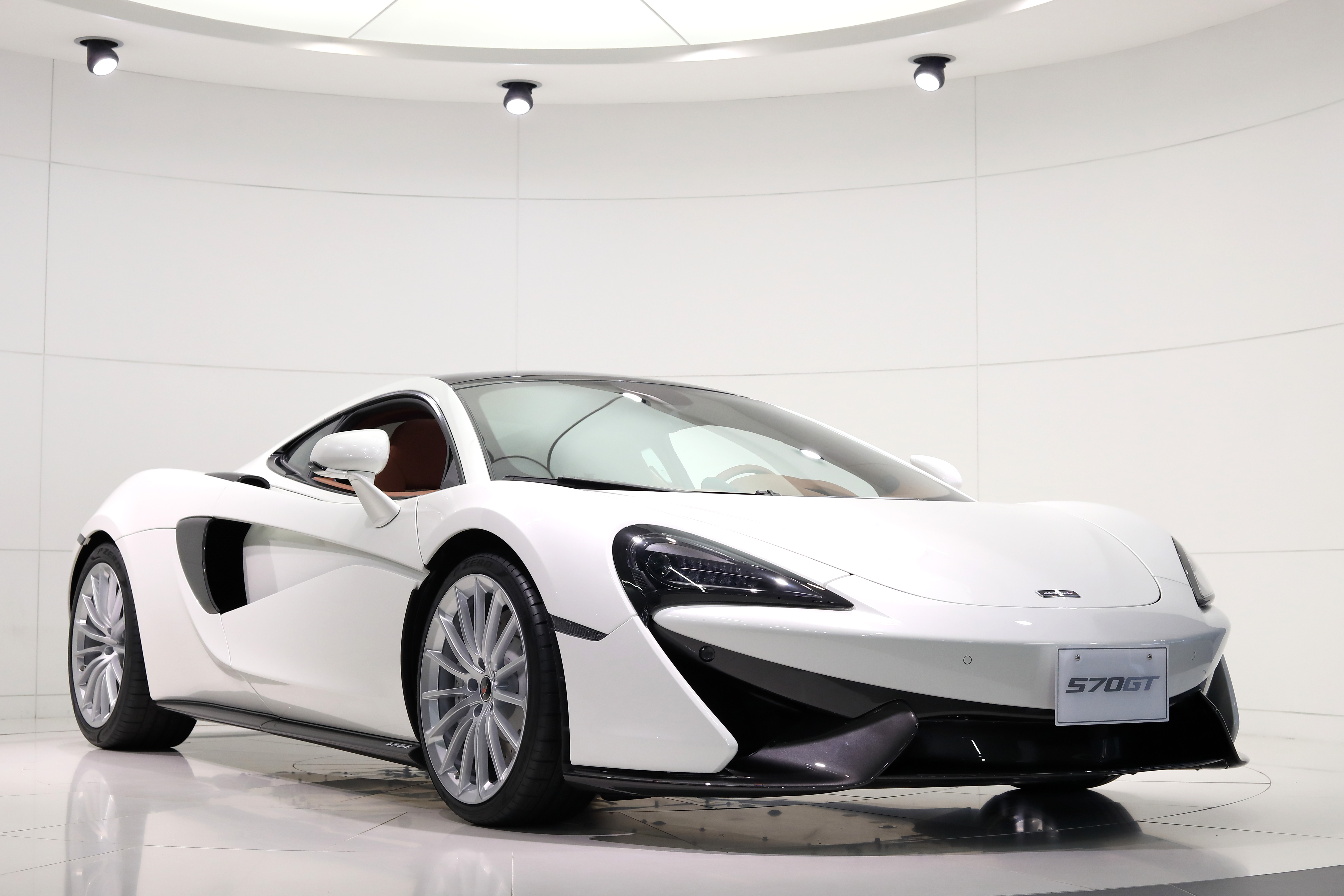 マクラーレンGT